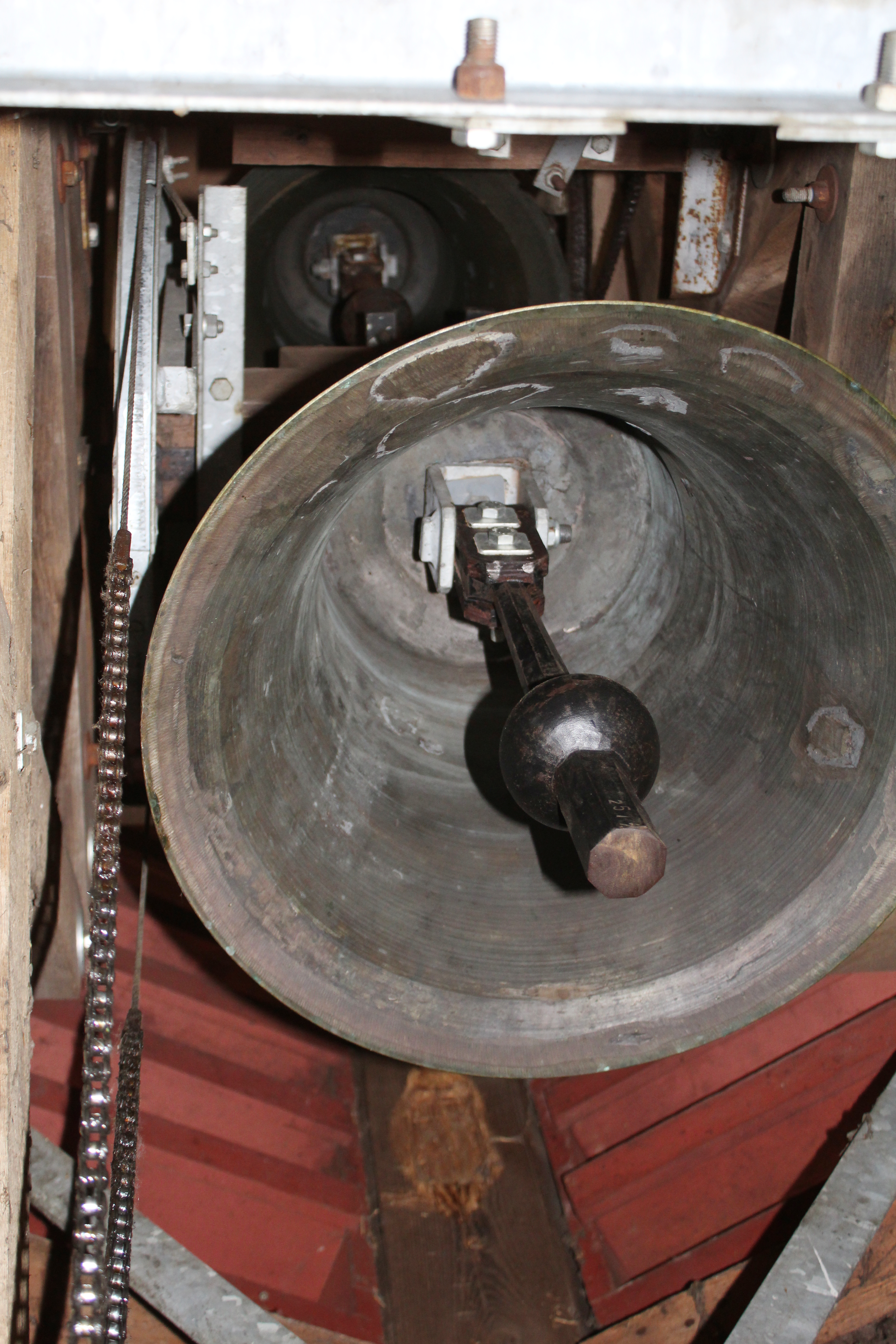 Evangelische Kirche Ilsdorf (ursprünglich Bernsfeld), Gemeinde Mücke, Vogelsbergkreis, Hessen, Deutschland